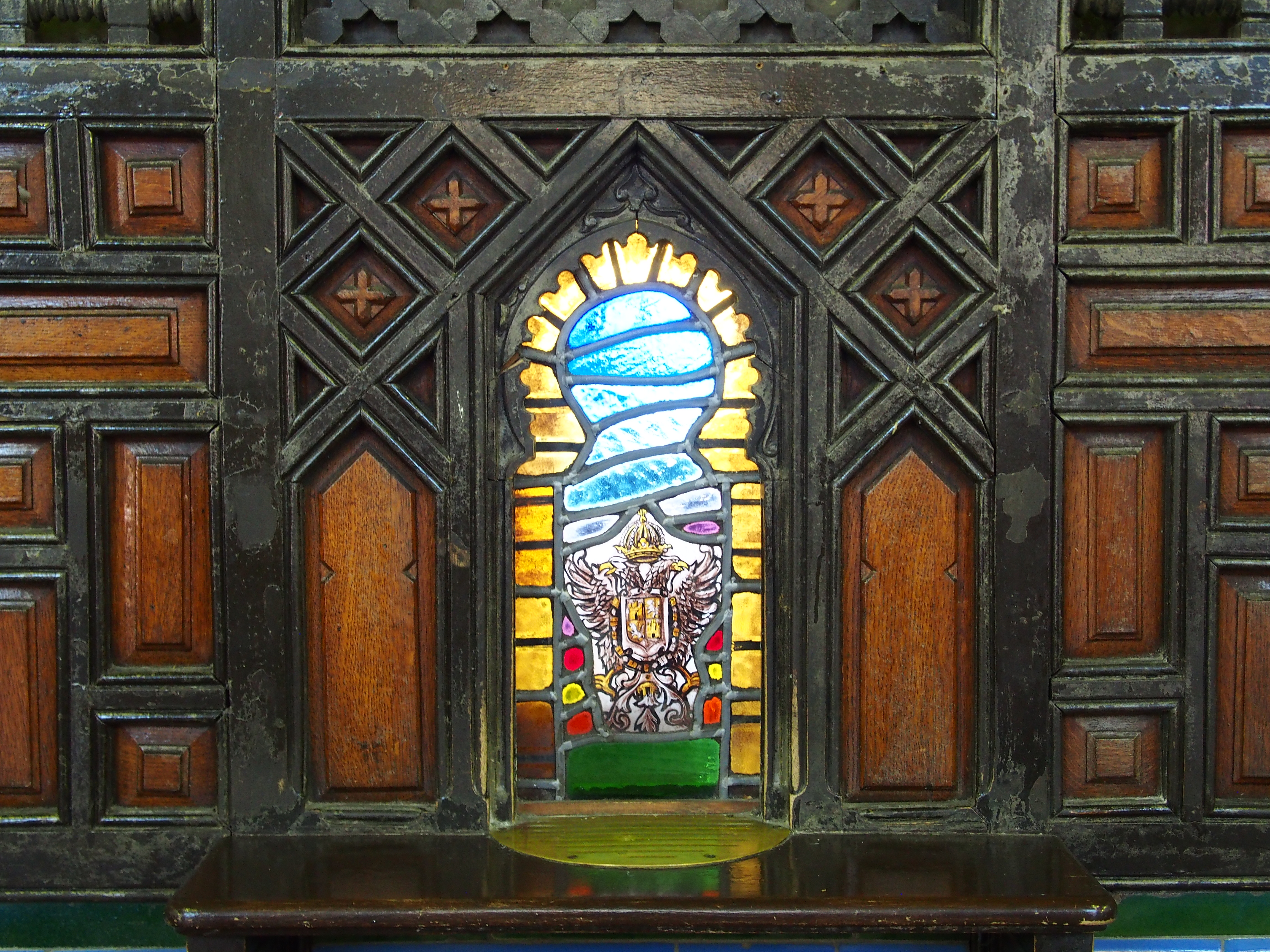 Detall de ventaneta on fins no fa molt encara es feia servir per treure bitllets.